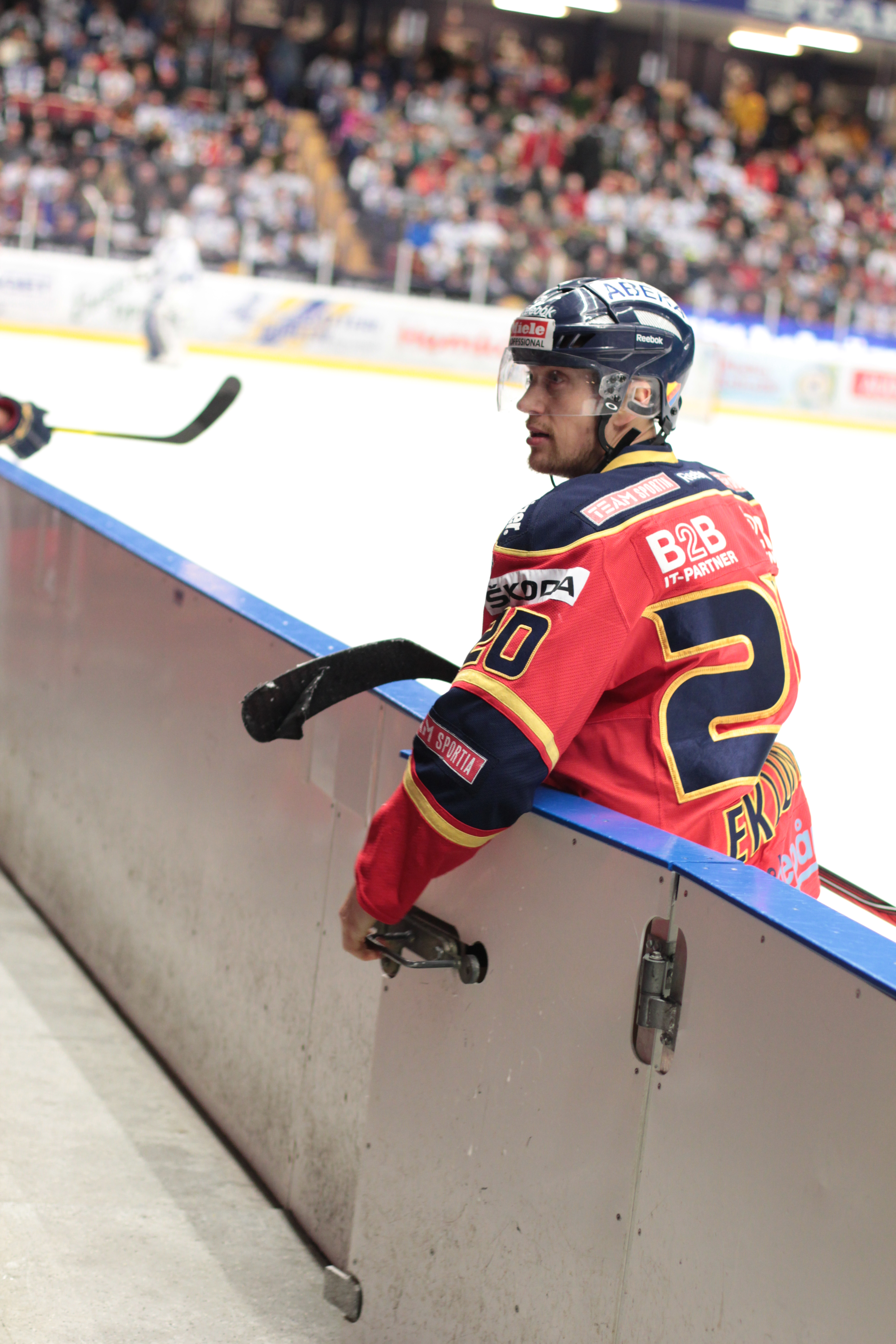 Christian Eklund i kvalmatchen mellan Leksands IF och Djurgårdens IF i Leksand 2012-03-31